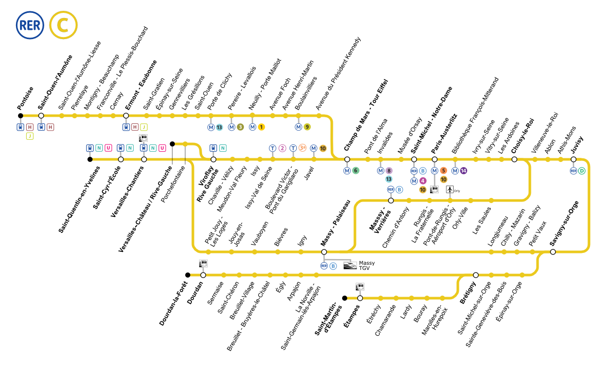 Plan schématique de la ligne C du RER de l'Île-de-France avec indication des correspondances (RER, Transilien, métro et tram).